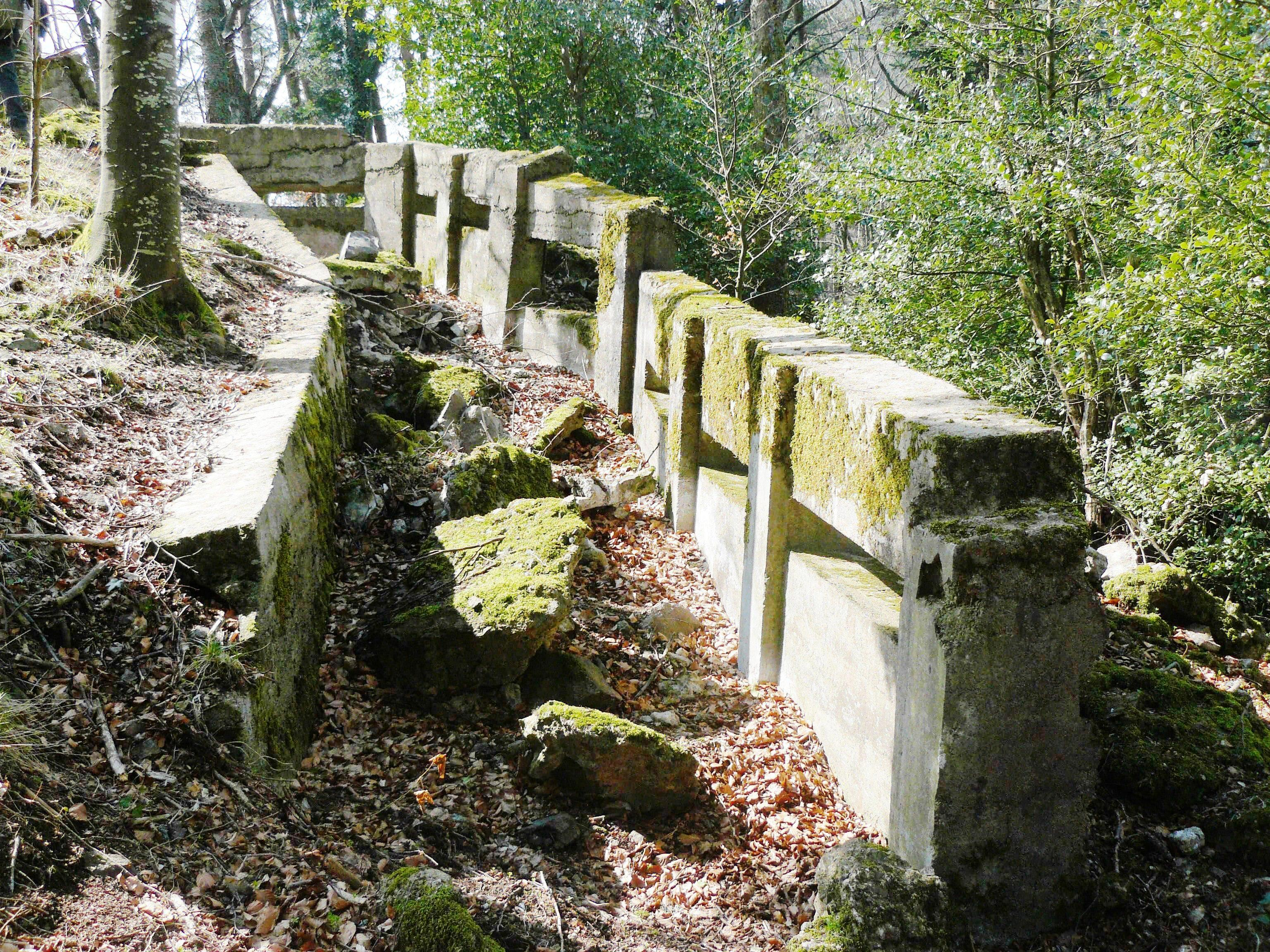 Rampes de tir au-dessus du Pain de Sucre servant à pilonner les positions ennemies pendant la guerre 1914-1918, Sainte Marie-aux-Mines